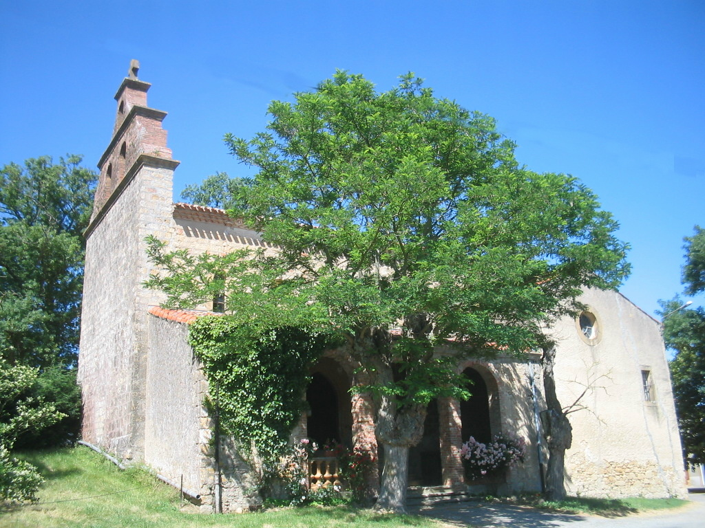 Eglise de Lafage.